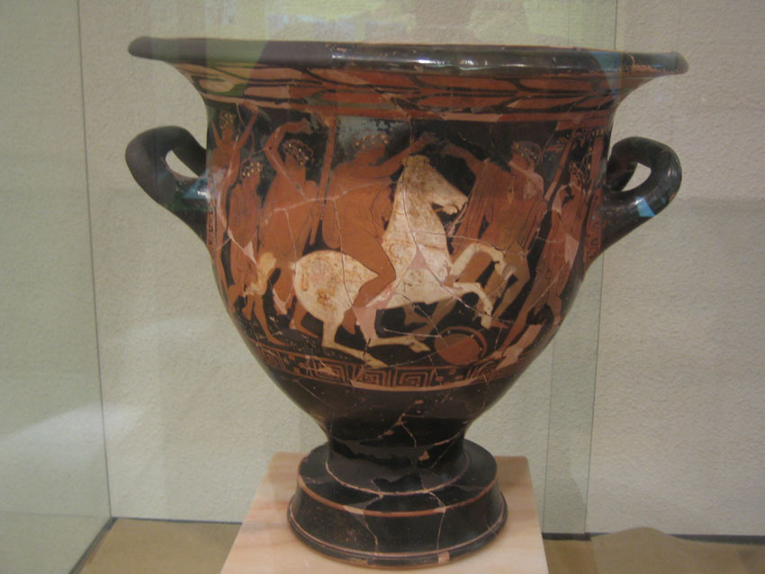 Crátera griega encontrada en una la necrópolis ibérica de Los Nietos en Cartagena (España). Describe una procesión en honor al dios Apolo. Sirvió como urna funeraria. Museo Arqueológico de Cartagena.